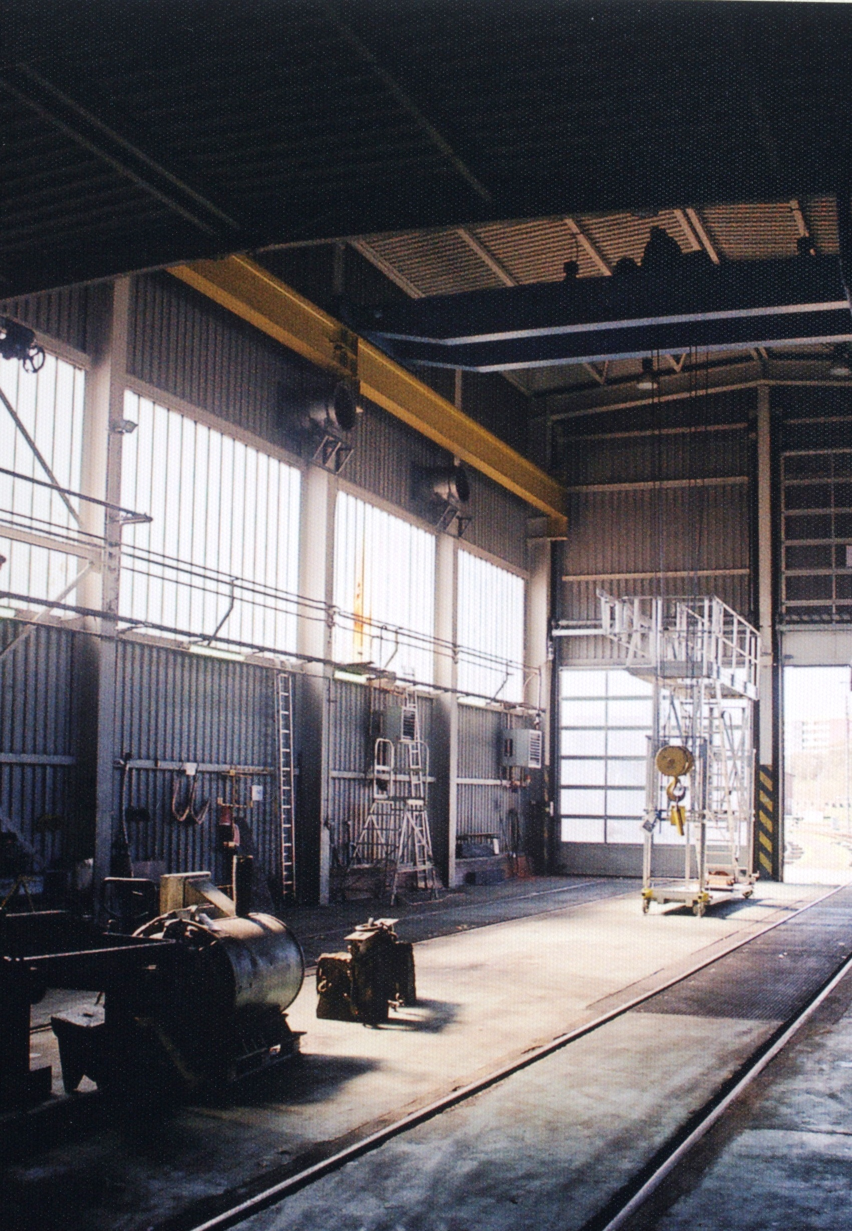 Innenansicht der Grosstausches des Bahnbetriebswerks Lübeck